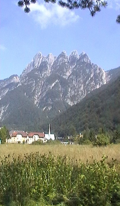 Der Fünfspitz bei Cave del Predil/Rabelj/Raibl im Aug 2005. Fotografiert aus der Richtung von Predil (Standpunkt: am örtlichen Friedhof). Autor: Besednjak. August 2005.